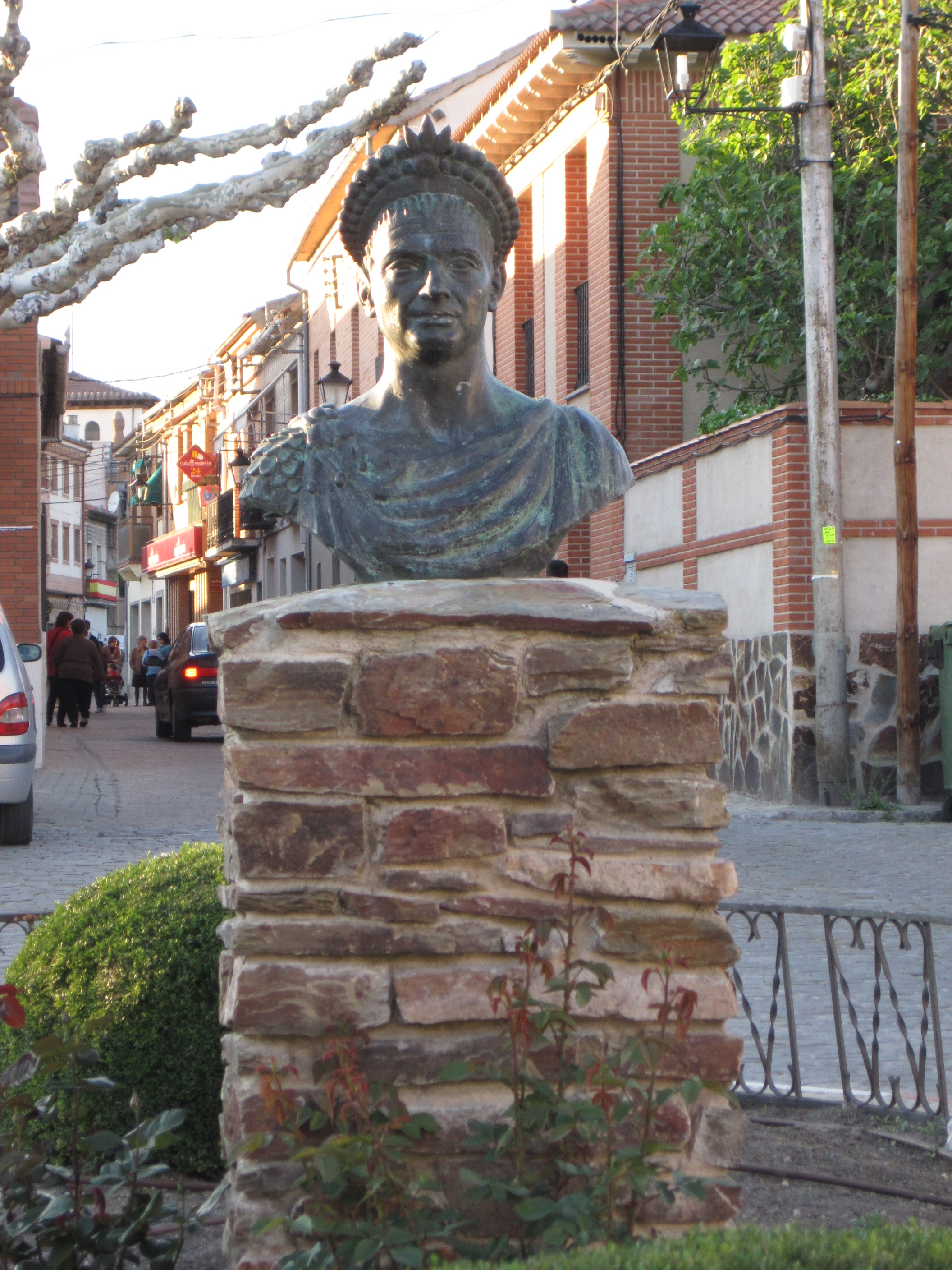 Retrato de Teodosio en una plaza de Coca (provincia de Segovia, España).